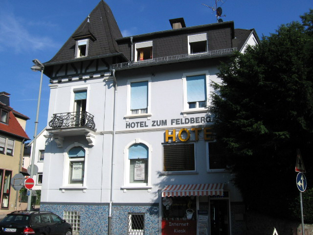 Ehemaliges Hotel Cahn in Königstein im Taunus (heute Hotel Feldberg). Dieses Hotel wurde von einem jüdischen Inhaber betrieben, der koscheres Essen anbot. Es war ein Ausflugsziel für viele Frankfurter Juden am Wochenende - aber auch langfristig weilende Kurgäste hielten sich dort auf. Peter Kohnstamm erwähnt das Hotel in seinen Lebenserinnerungen. Hier der Eintrag über den Betreiber des Hotels im "Gedenkbuch - Opfer der Verfolgung der Juden unter der nationalsozialistischen Gewaltherrschaft in Deutschland 1933 – 1945": Ausgewählter Eintrag Cahn, Albert: 17. Februar 1888 in Königstein i. Taunus, wohnhaft in Königstein i. Taunus, Deportation: ab Frankfurt a. Main 01. September 1942, Theresienstadt, Ghetto 23. Januar 1943, Auschwitz, Vernichtungslager